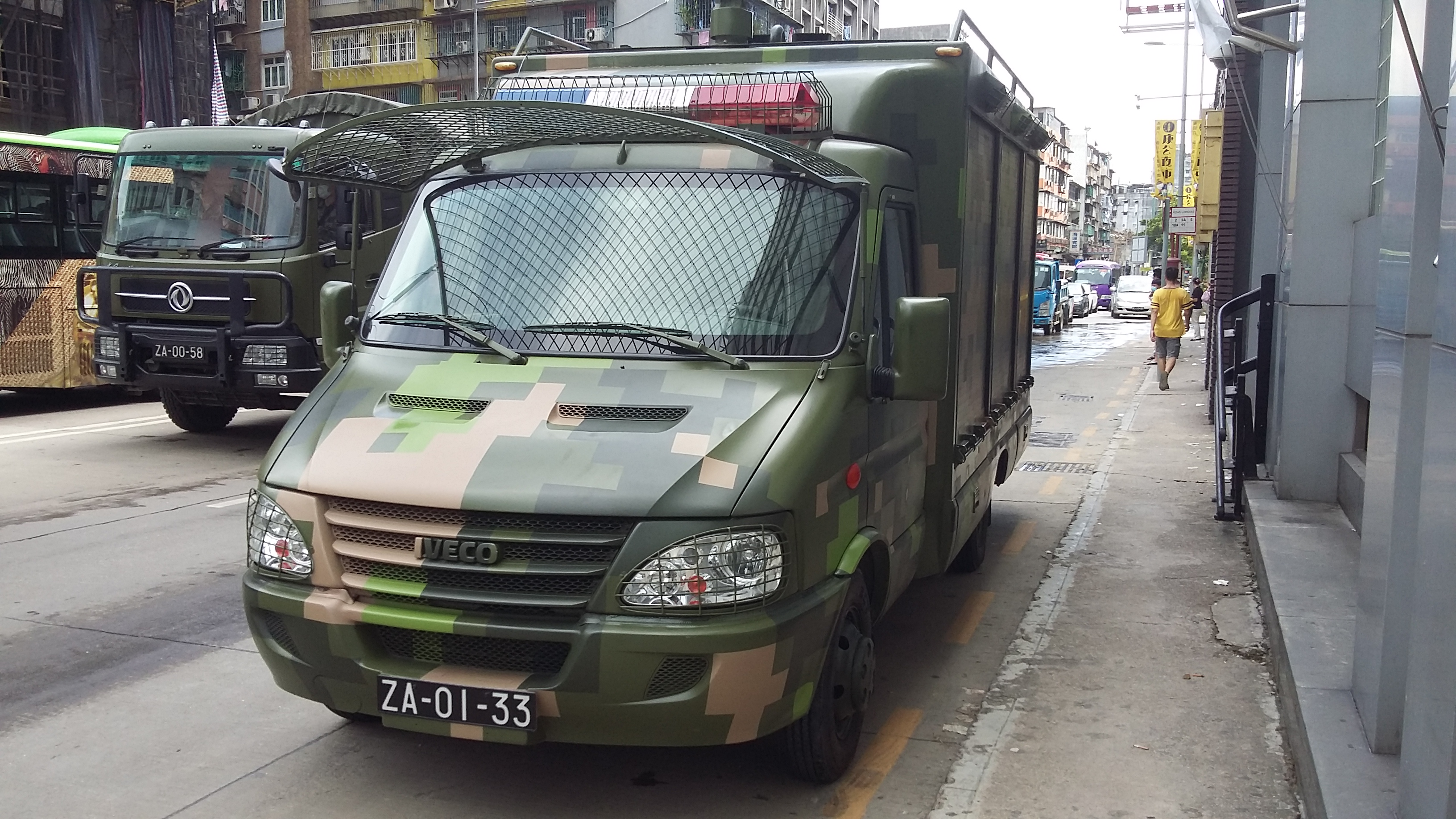 風暴過後第二日，風順堂區情況。